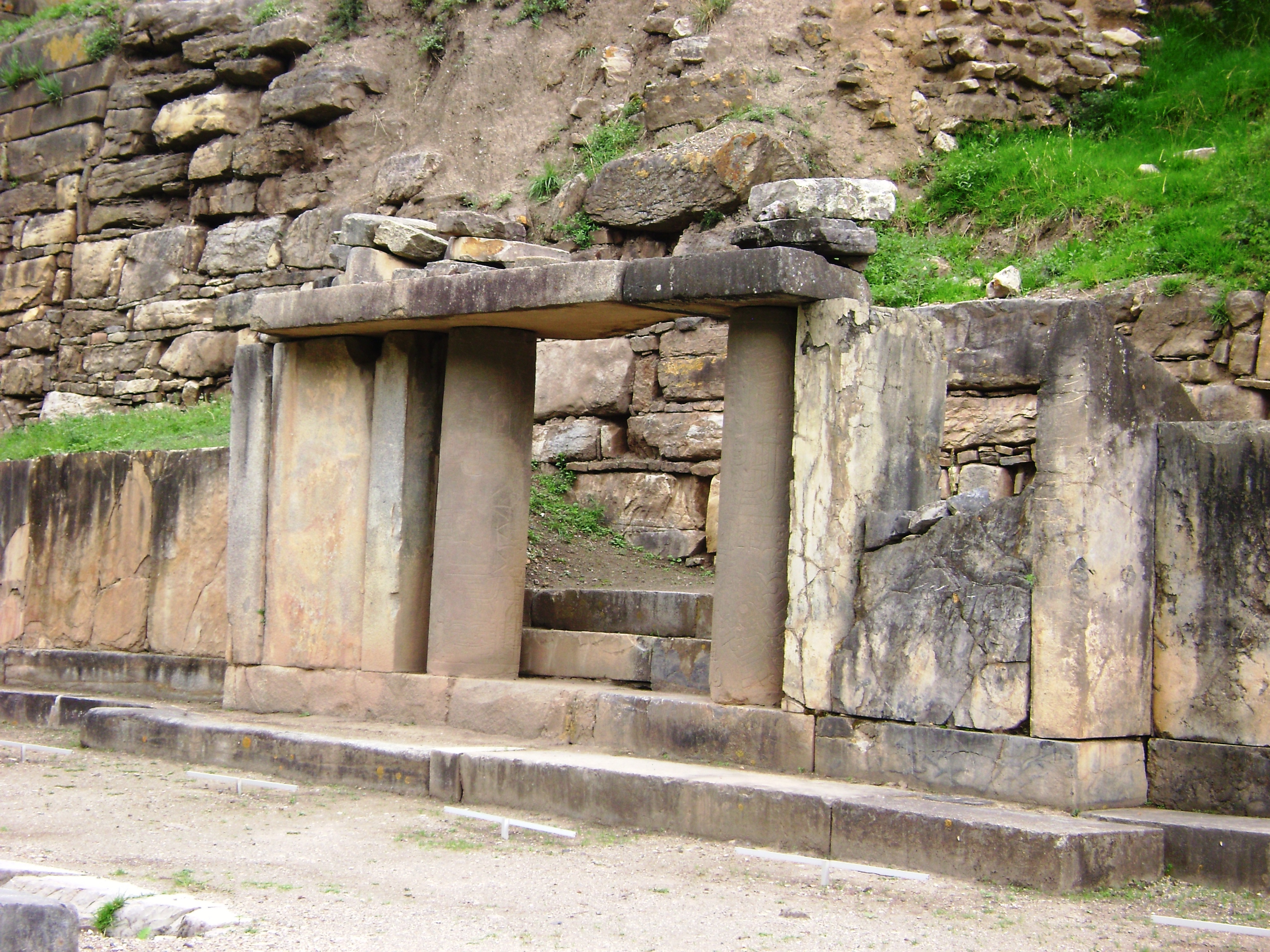 "Pórtico de las Falcónidas", estructura de ingreso a "El Castillo" en la sección "Templo Nuevo" en el sitio arqueológico "Chavín de Huántar". Región Ancash - Perú.